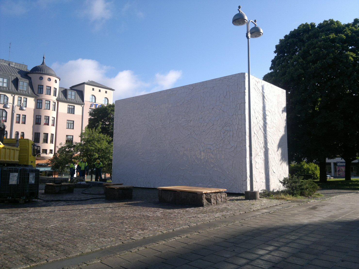 Puutorin taideteos, Iglu